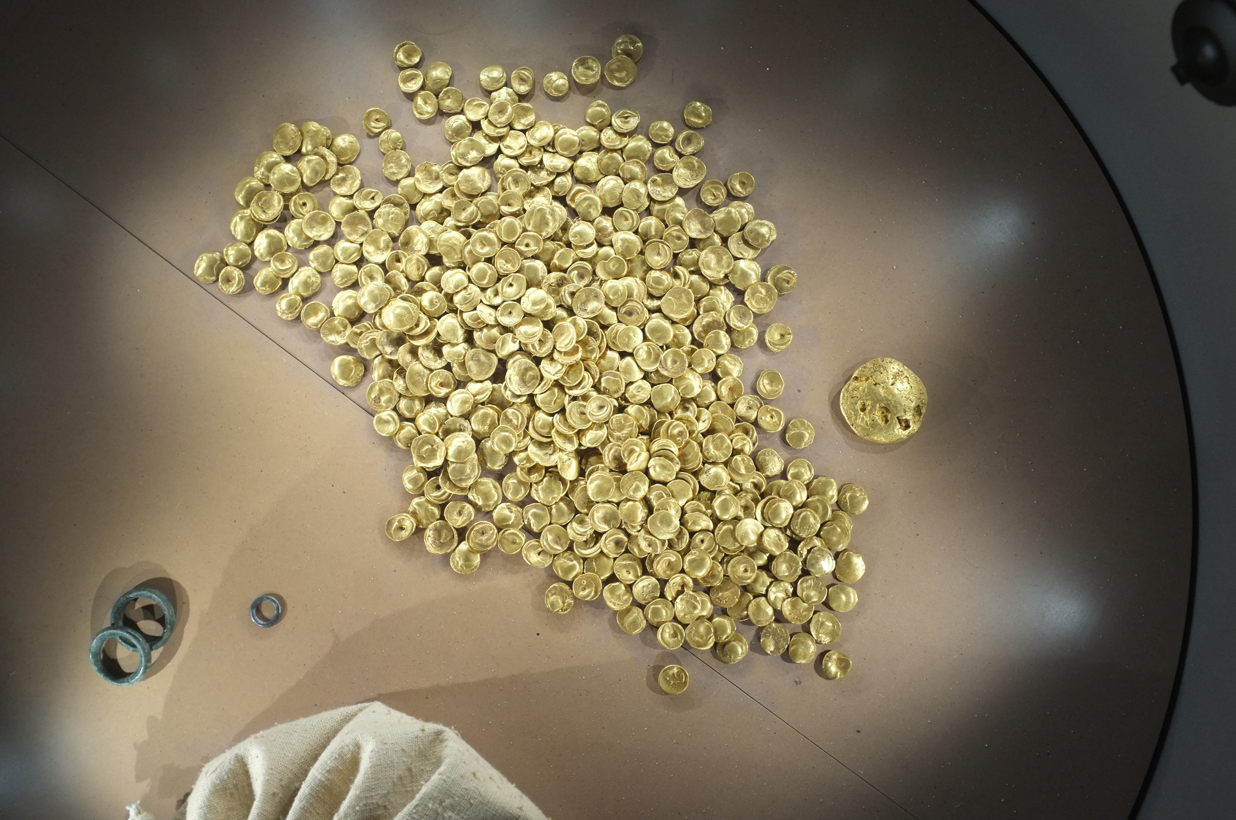 Der Goldschatz aus dem Oppidum von Manching